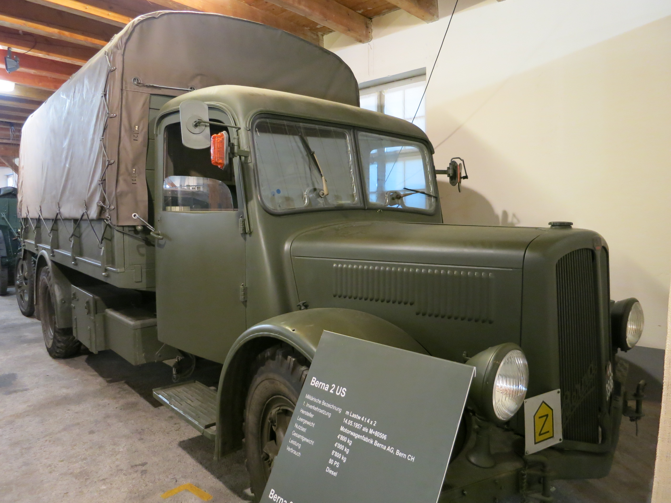 Museum im Zeughaus, Schaffhausen SH, Schweiz